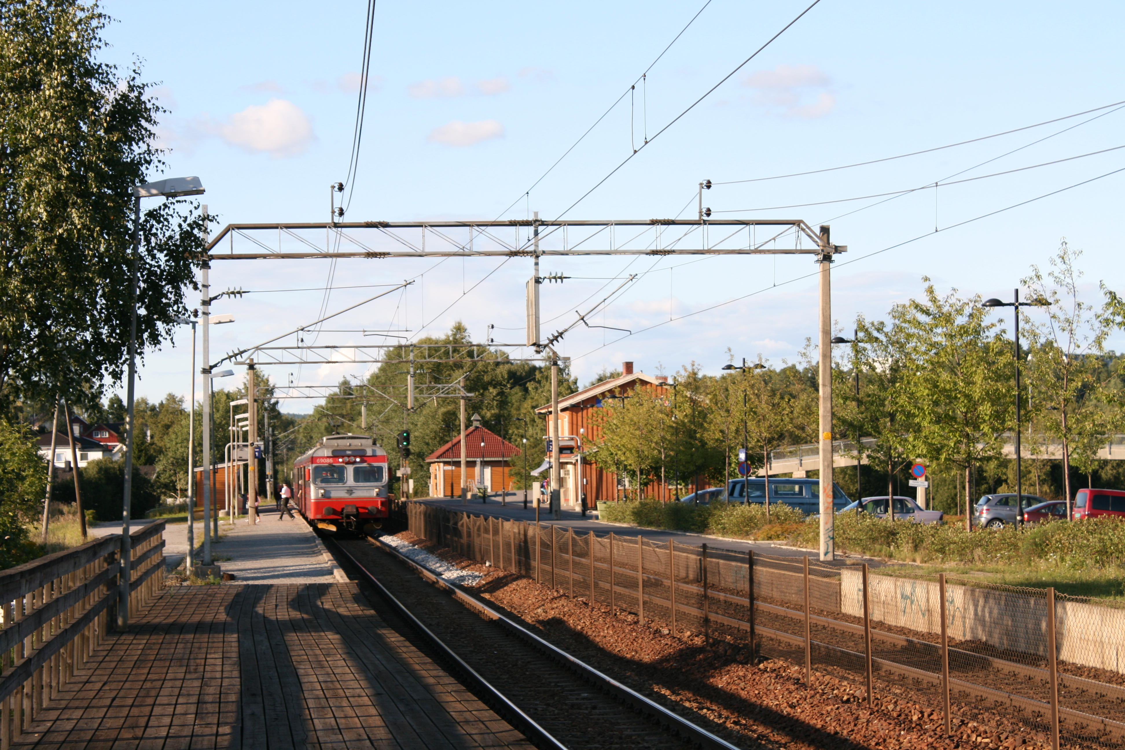 Langhus stasjon 2008